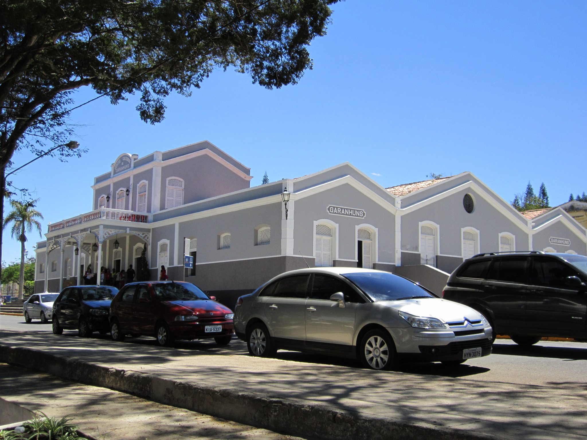 Centro Cultural - Garanhuns, Pernambuco, Brasil